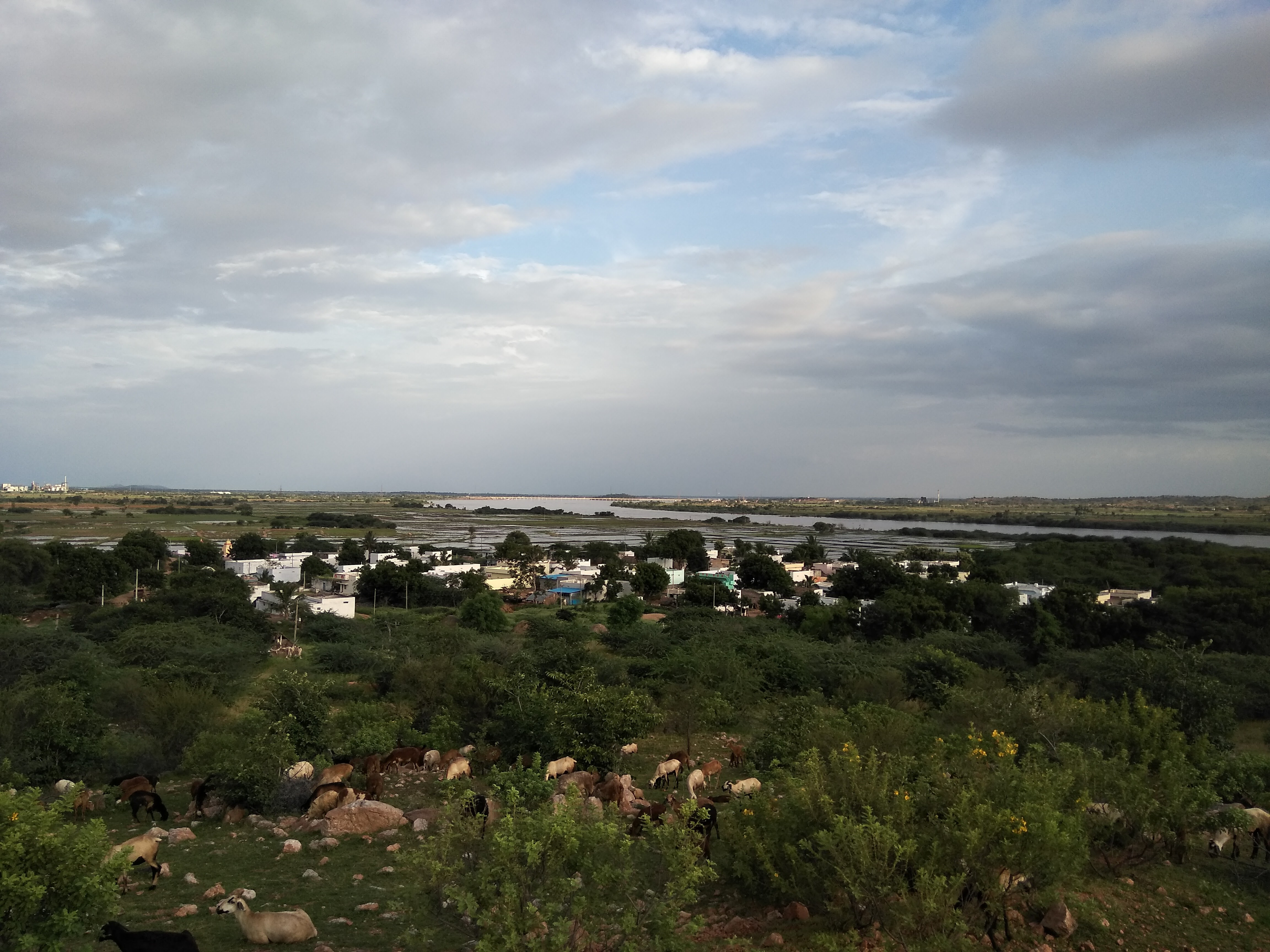 గుర్రంగడ్డ గ్రామం